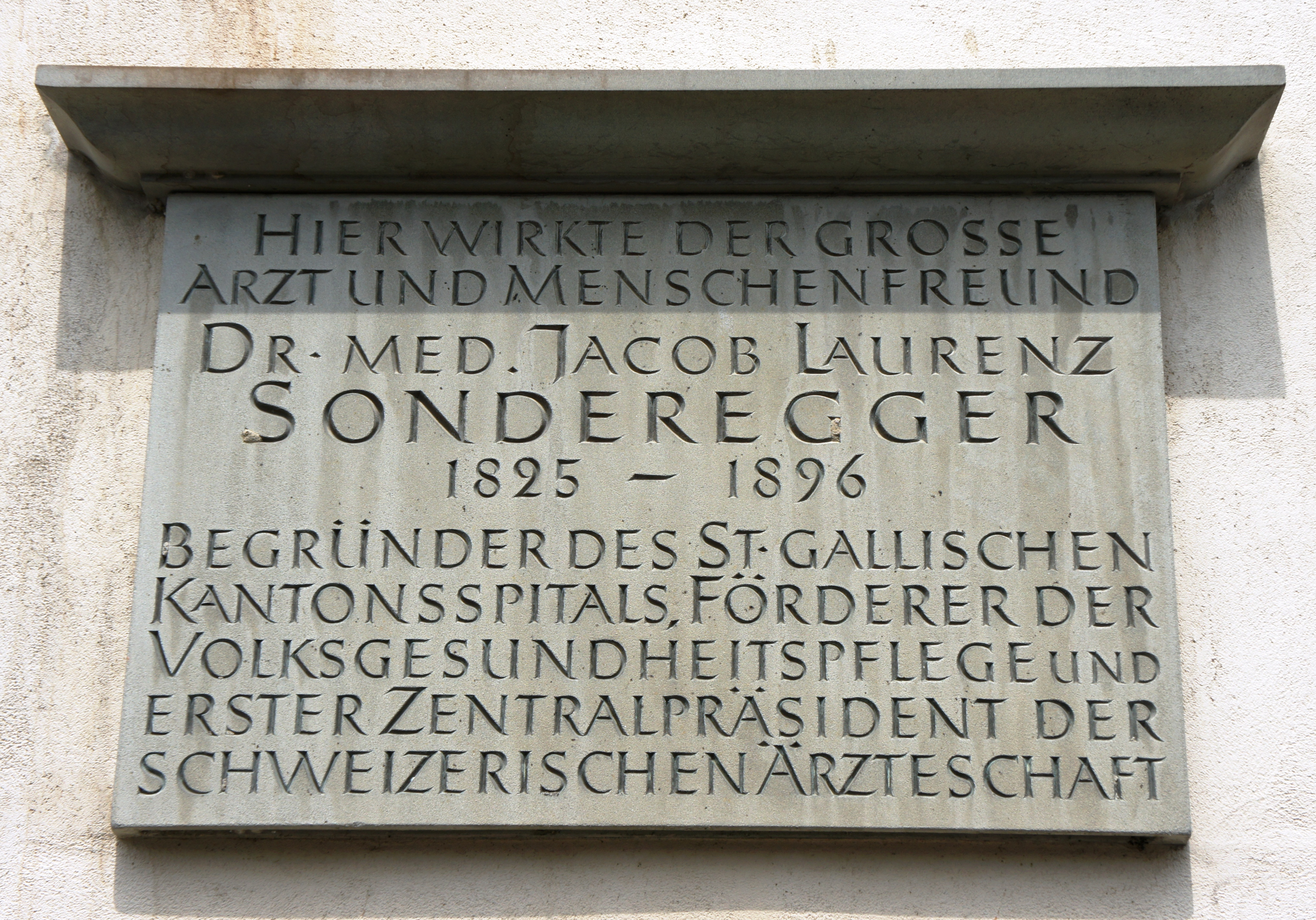 Gedenktafel für Jacob Laurenz Sonderegger am Haus an der Hauptstrasse 78 in Balgach.